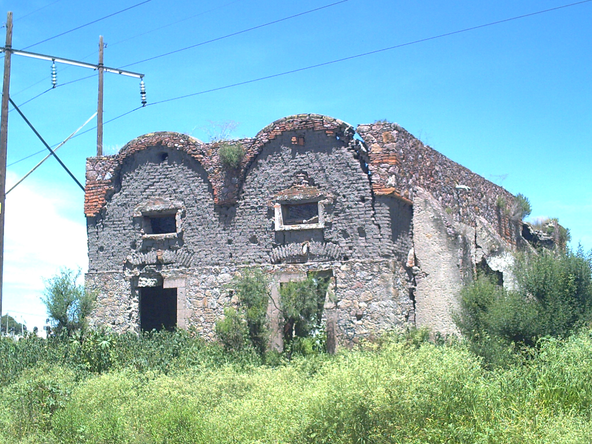 Ruinas de la ex hacienda de Santiago